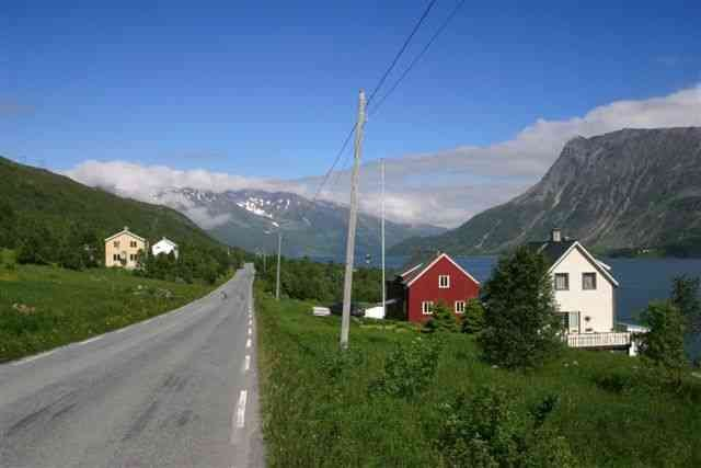 Bekkenesset i Kvæfjord